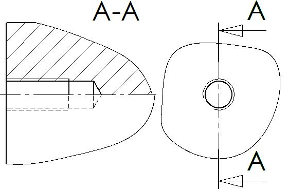 Représentation normalisée d'un trou taraudé non débouchant. Vue radiale, vue axiale en demi coupe Norme NF E 04-012 ISO 6410 Mise en plan SolidWorks.